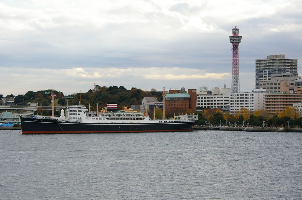 Hikawamaru and Marine tower, Yokohama,Japan Taken by Los688,2006-12-10 PD-self 横浜・氷川丸とマリンタワー 2006年12月10日撮影